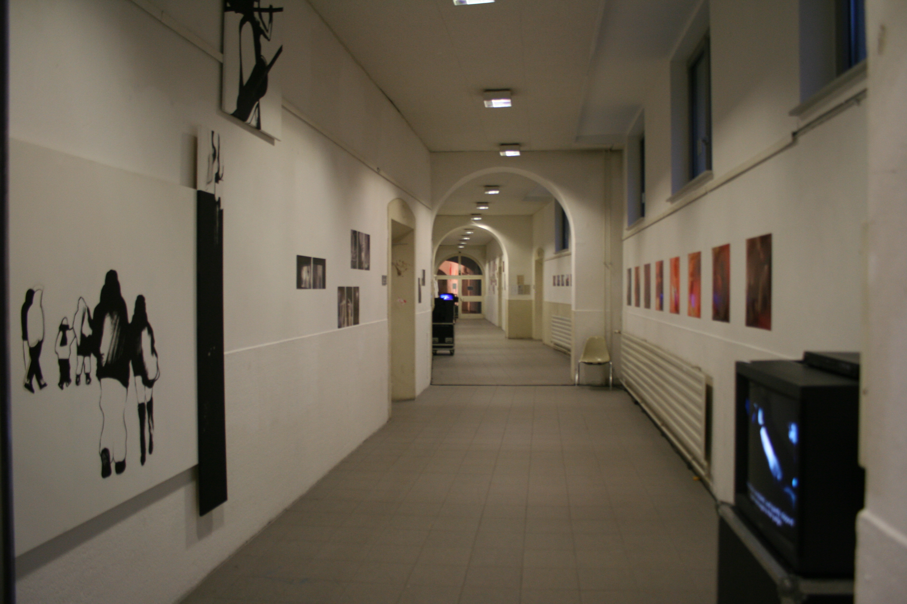 HfG Offenbach Innenansicht